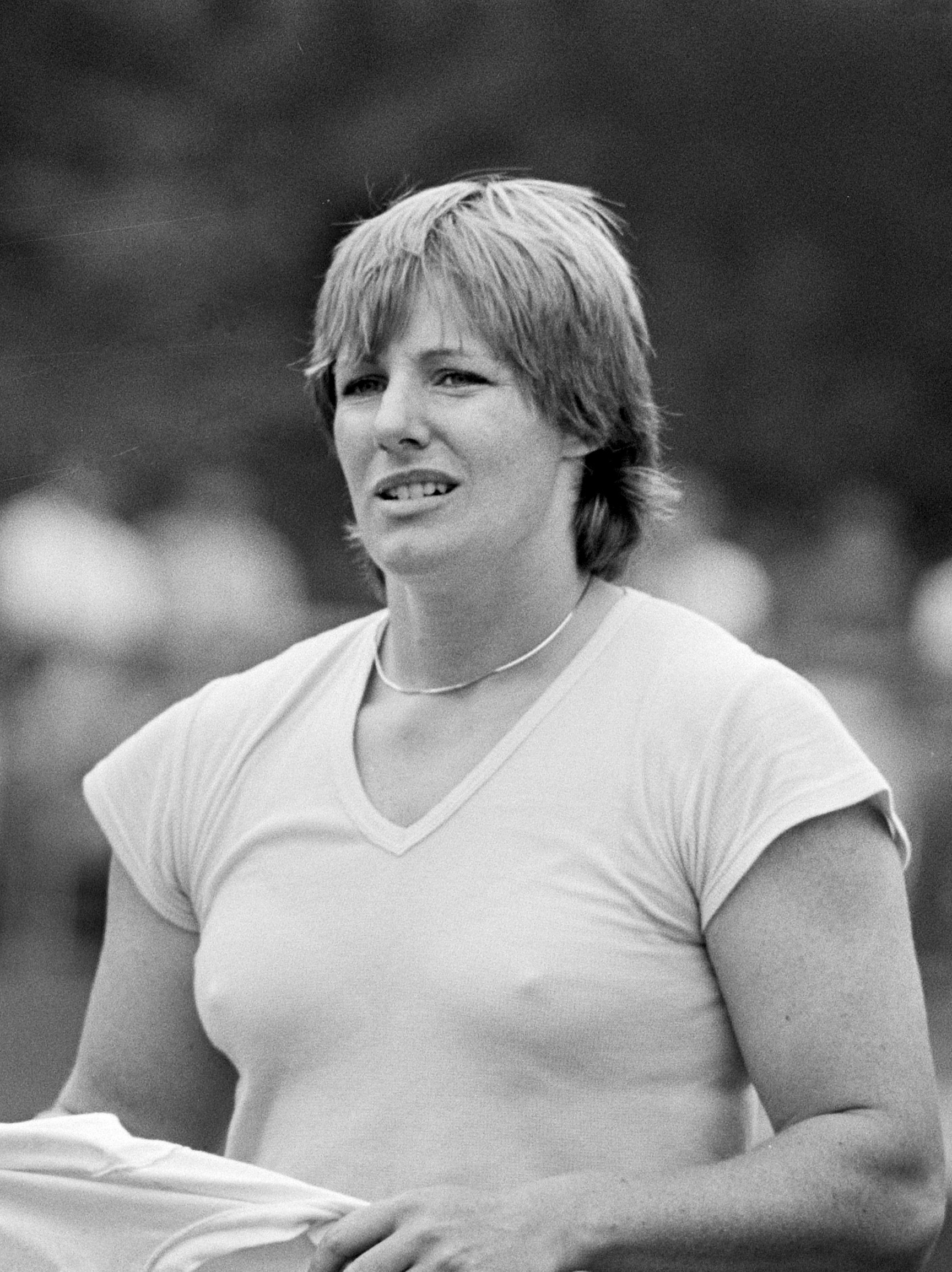 Nederlandse kampioenschappen atletiek in Amsterdam; winnares discuswerpen Ria Stalman in aktie, close